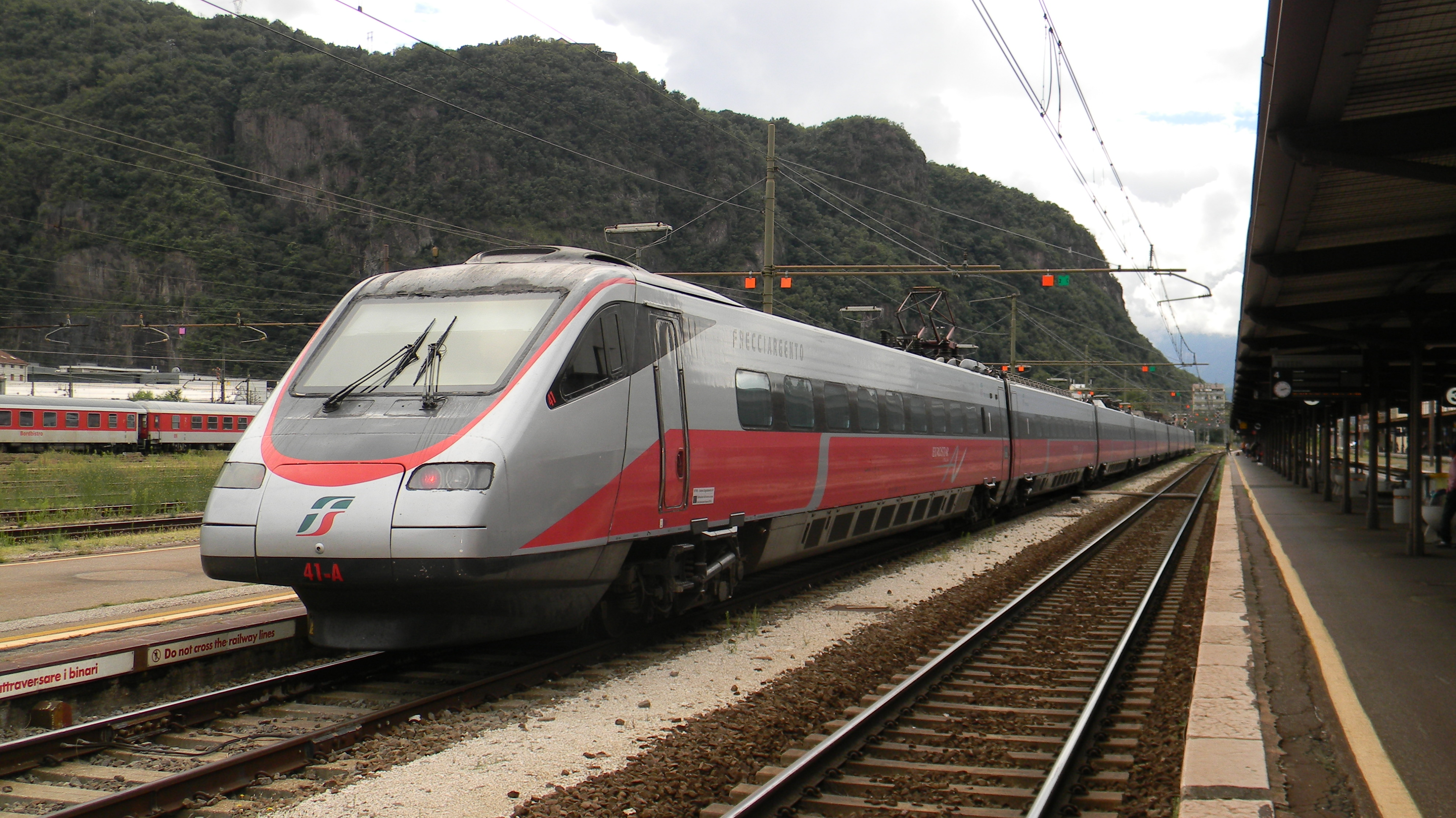 Elettrotreno ETR 485 di Trenitalia in sosta a Bolzano